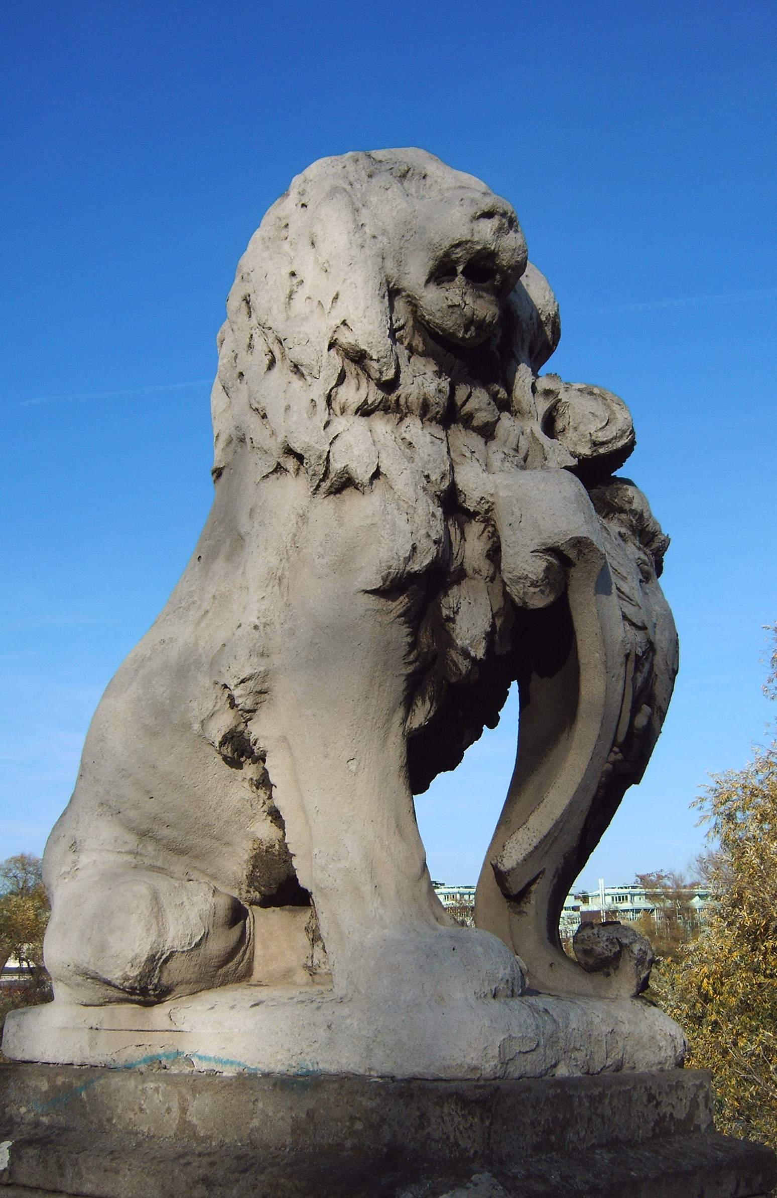 Anna-Ebert-Brücke in Magdeburg, Germany; Löwenplastik am nordöstlichen Ende der Brücke